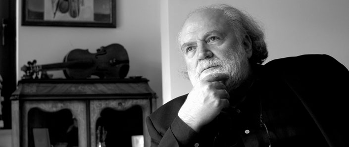 Ο συνθέτης Γιάννης Μαρκόπουλος